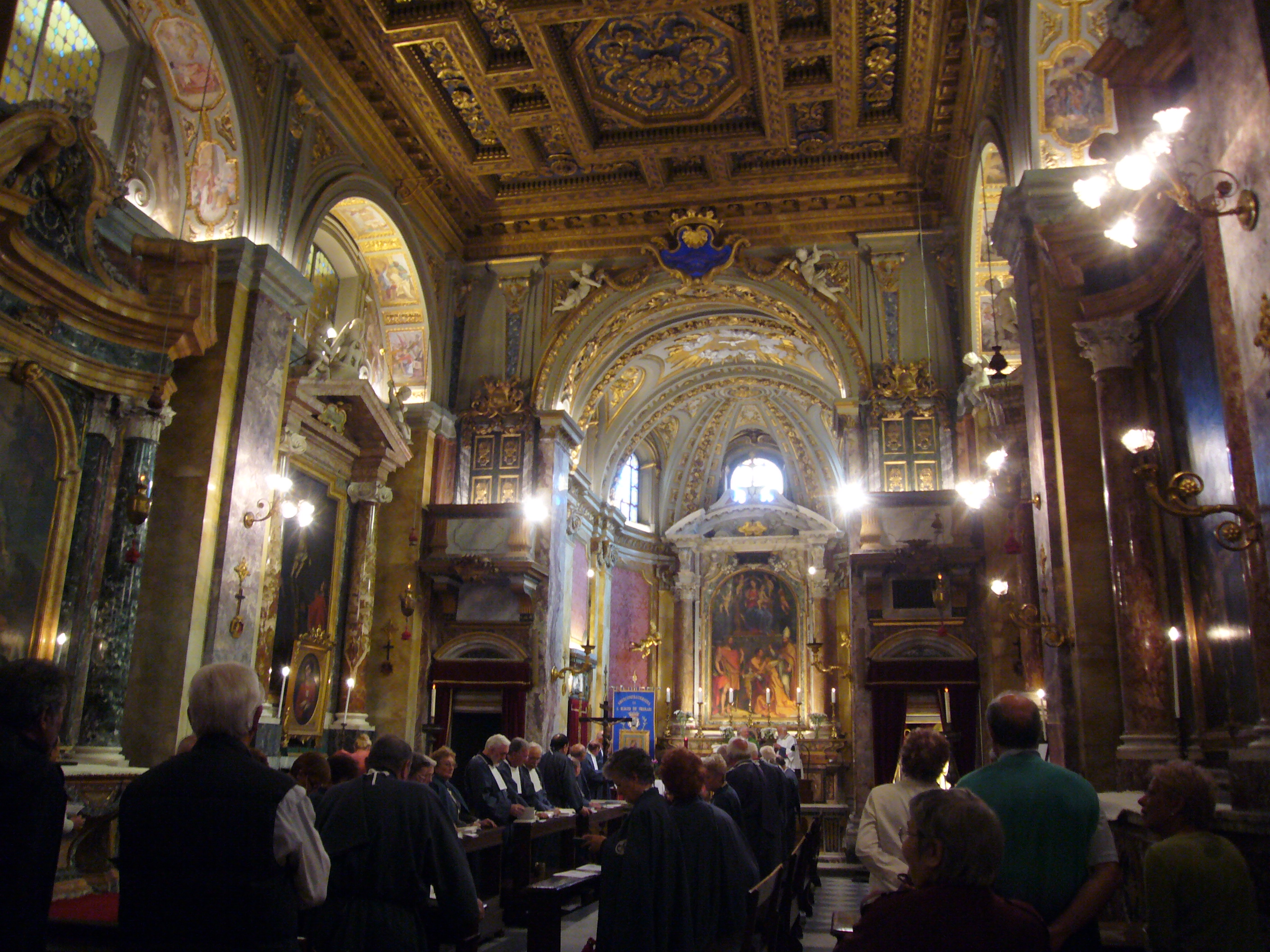 Roma, sant'Eligio dei Ferrari, interno